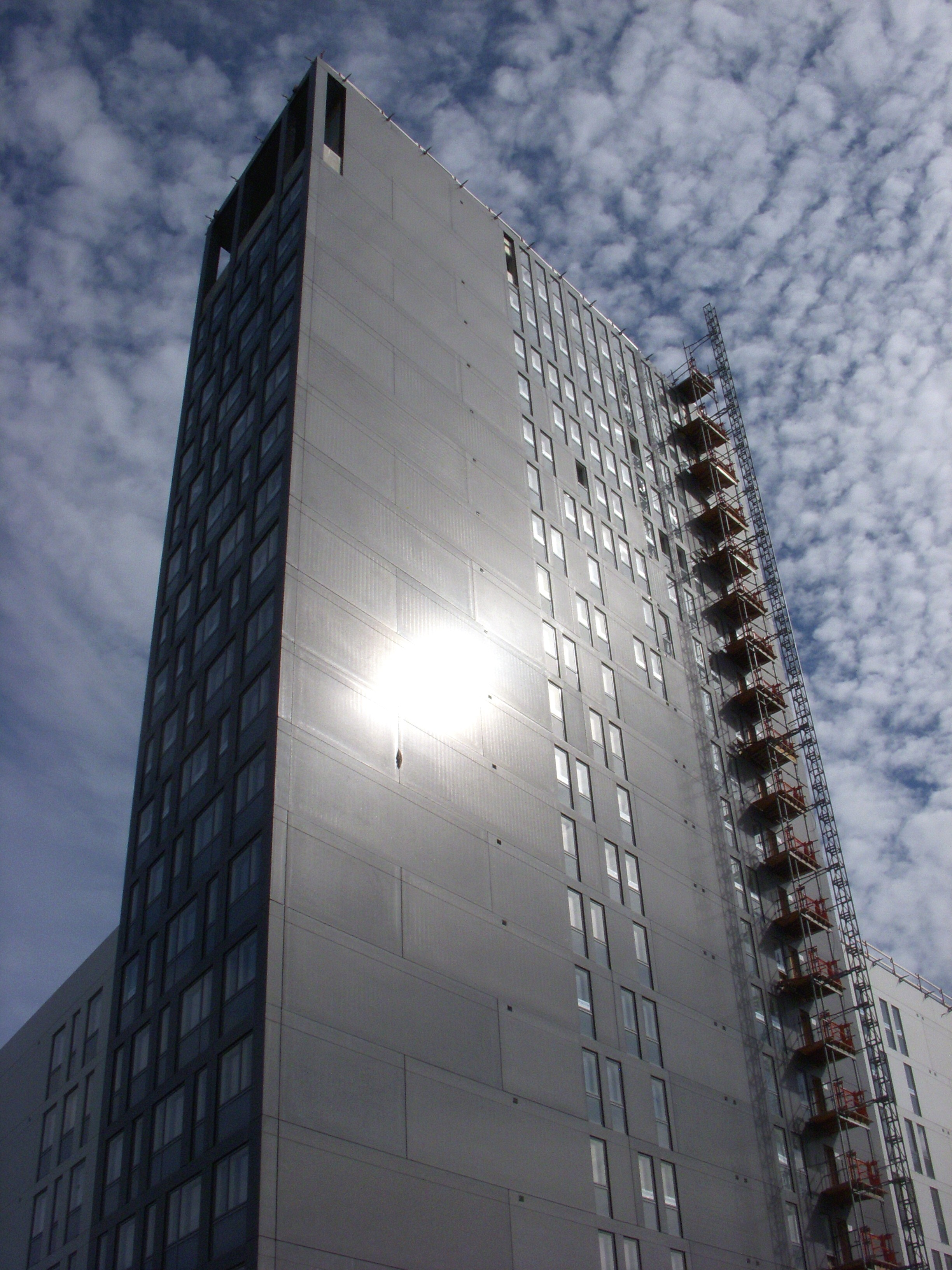 Tillingstorn (det östra) för "Kungsholmsporten" i kvarteret Brovakten på Kungsholmen.